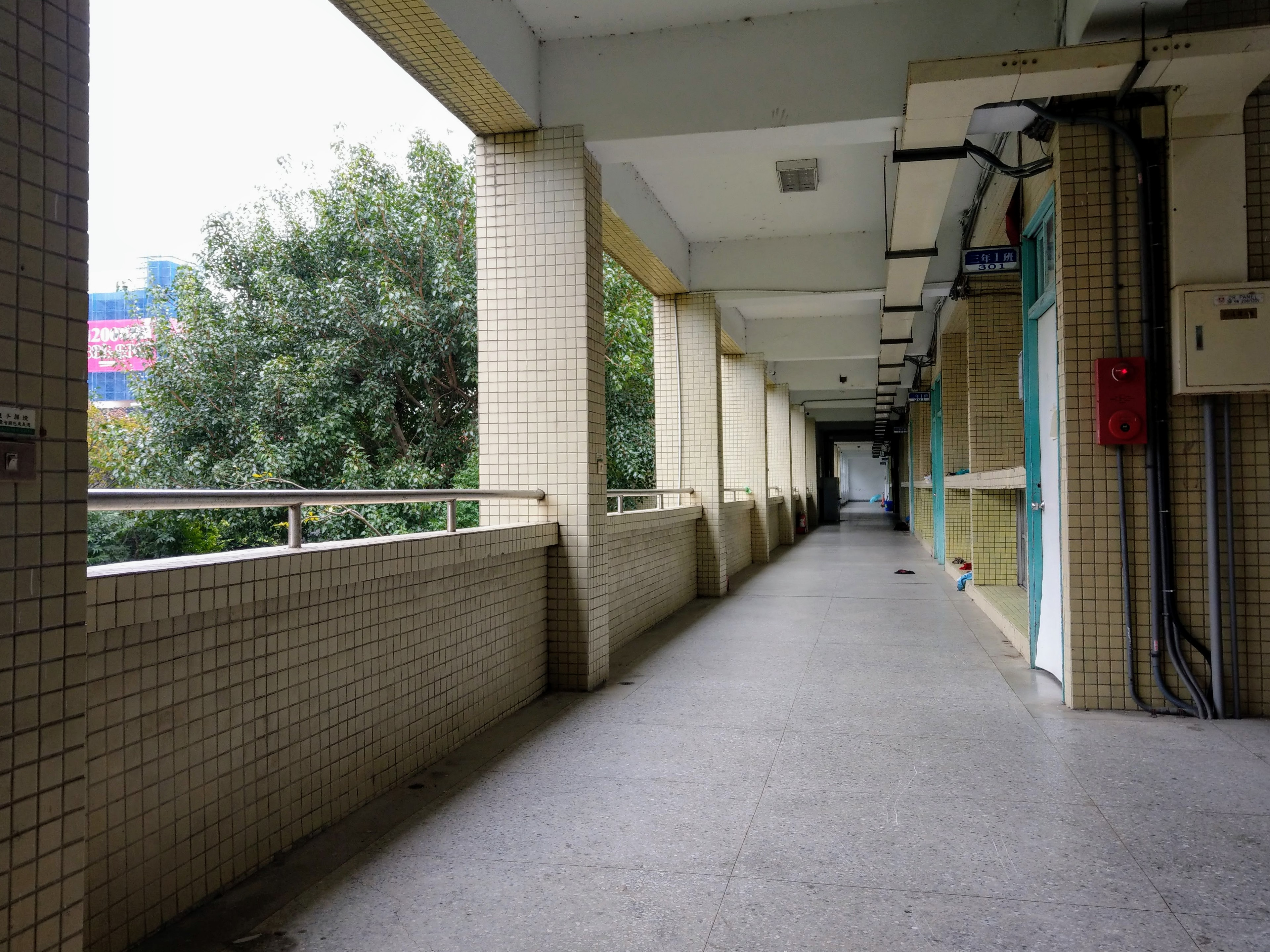 桃園市立武陵高中志清樓長廊